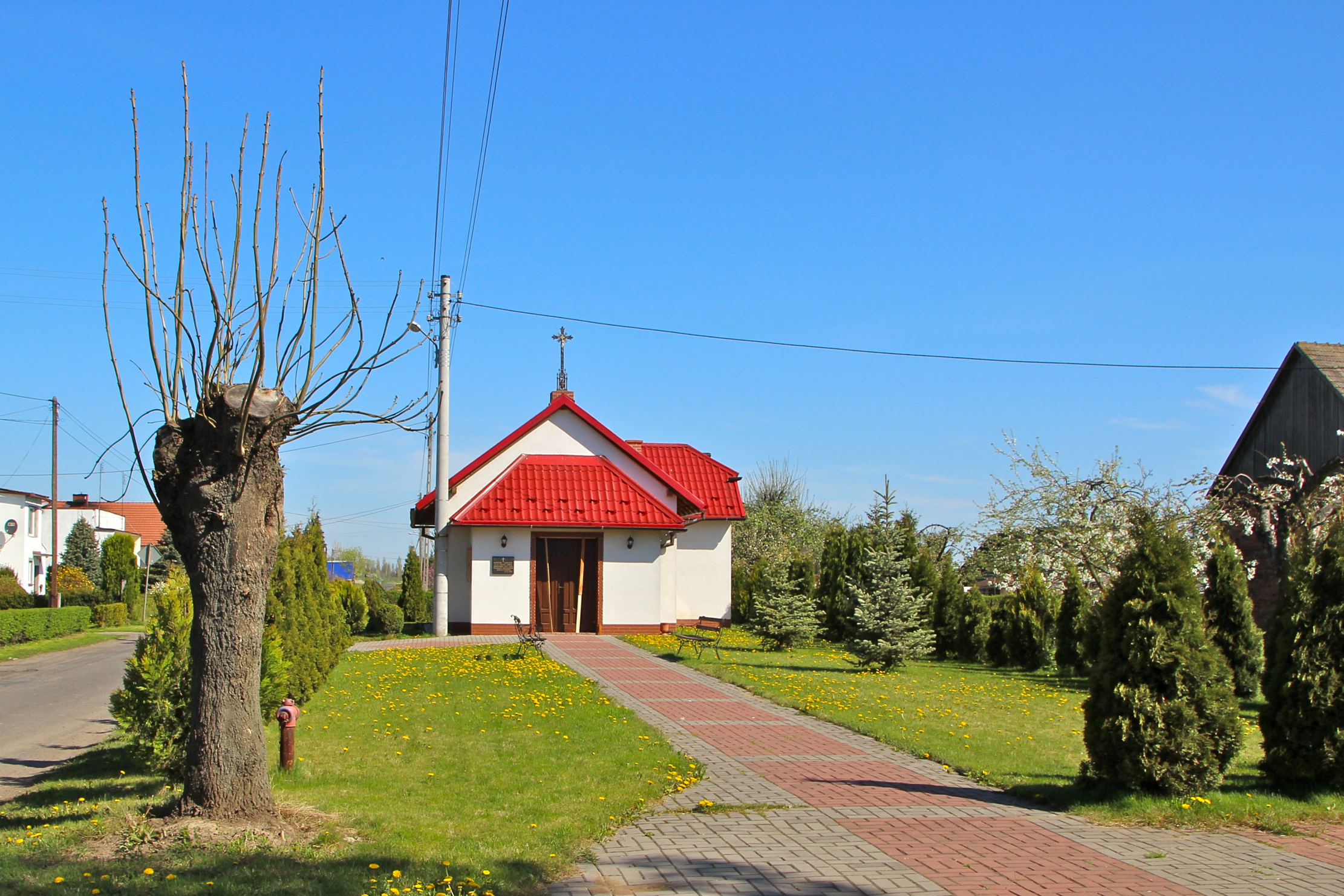 Nowy Rożnów - wieś w Polsce położona w województwie opolskim, w powiecie głubczyckim, w gminie Głubczyce.